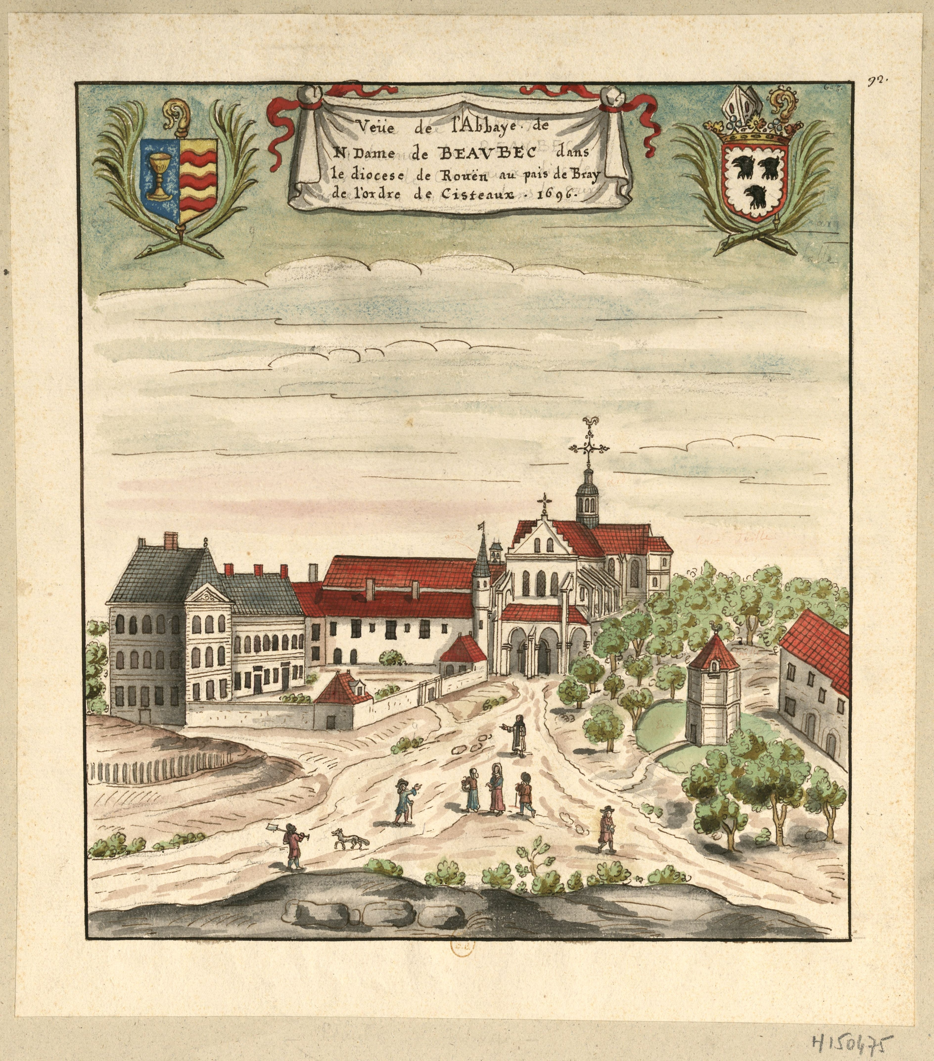 Vue de l'Abbaye cistercienne de Beaubec (diocèse de Rouen, pays de Bray) en 1696 (dessin de Louis Boudan).